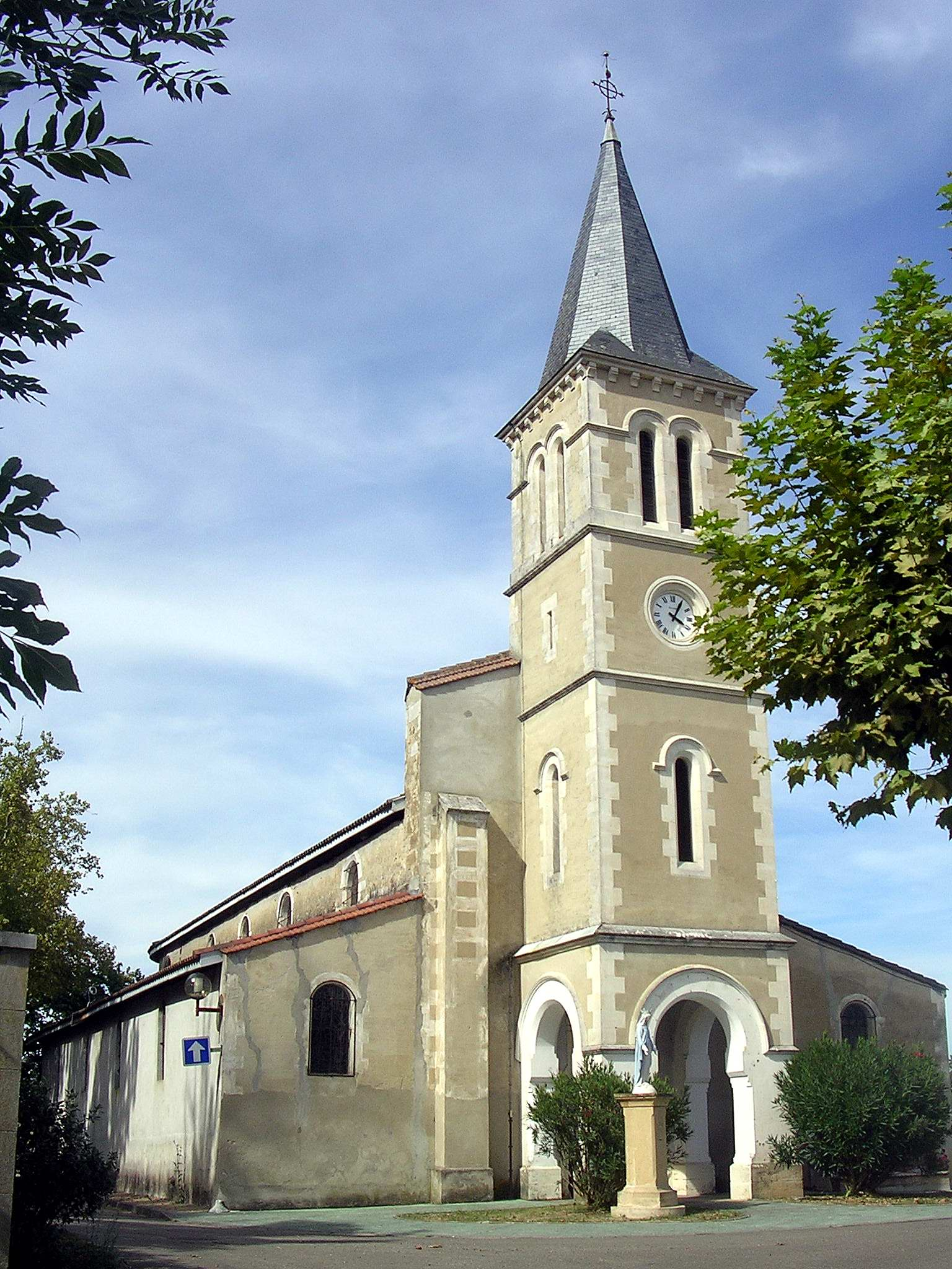 Eglise de Cauna, dans le département français des Landes